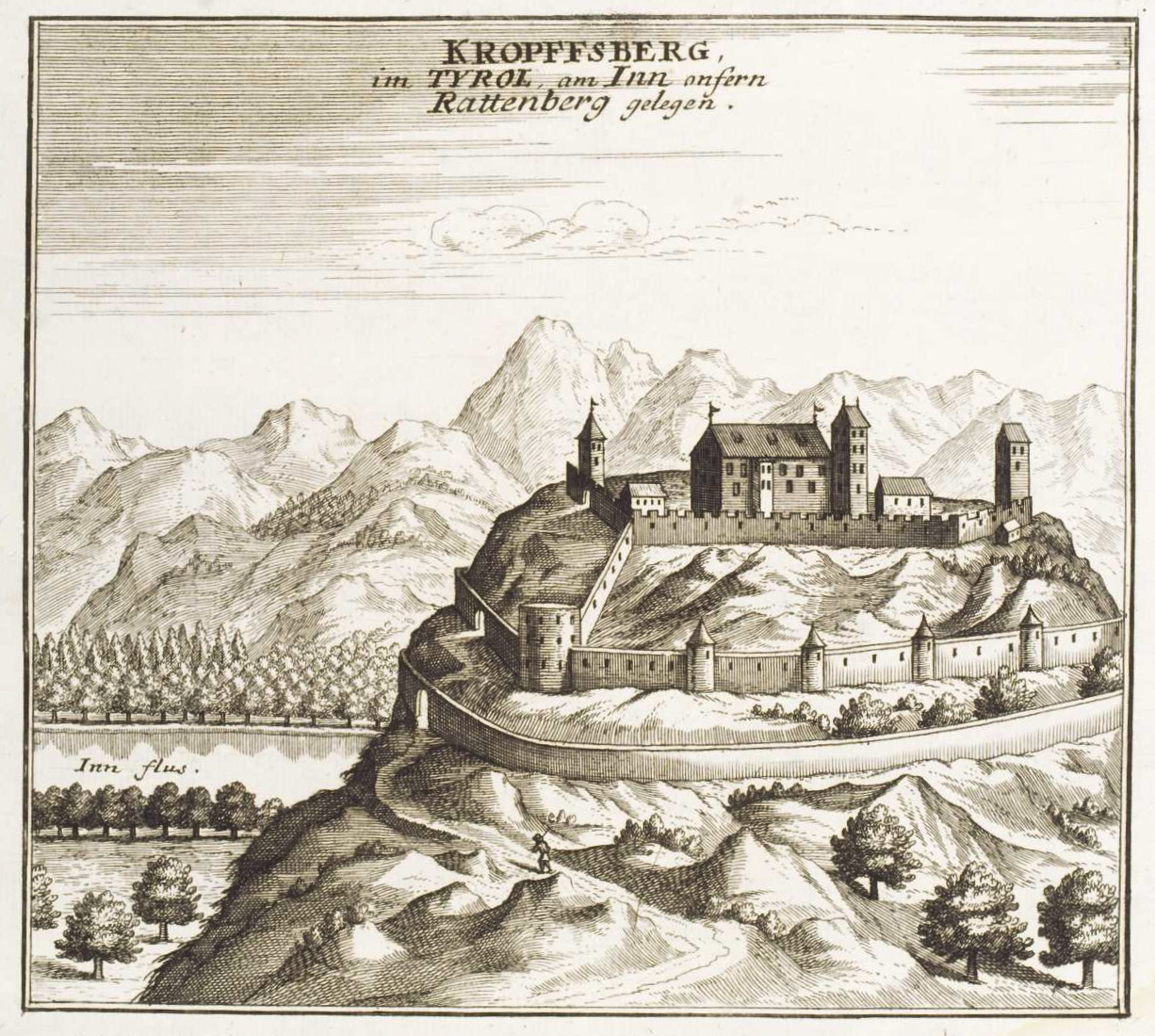 Curioses Staats und Kriegs Theatrum Dermahliger Begebenheiten im Tyrol : durch Unterschiedliche Geographische, Hydrographische, Topographische, Chronologische, Genealogische, Historische &c. Carten, Abrisse, und Tabellen Erlaeutert, Augspurg : Stridbeck, [ca. 1700] Kropffsberg